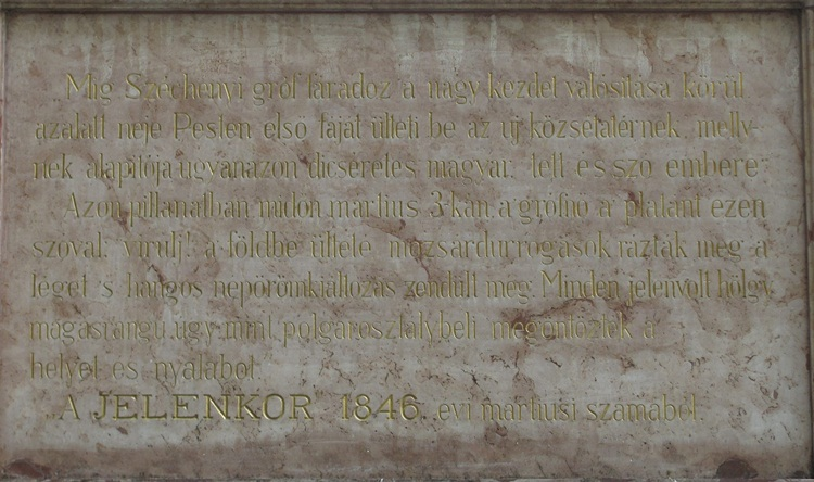 A Virulj! emlékkút (Széchenyi-emlékkút) hátoldalán található kőtábla (Budapest, V. kerület, Szabadság tér déli része)